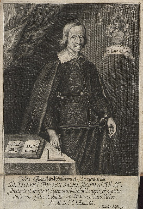 Original image description from the Deutsche Fotothek Mechanik & Bibliographie & Porträt